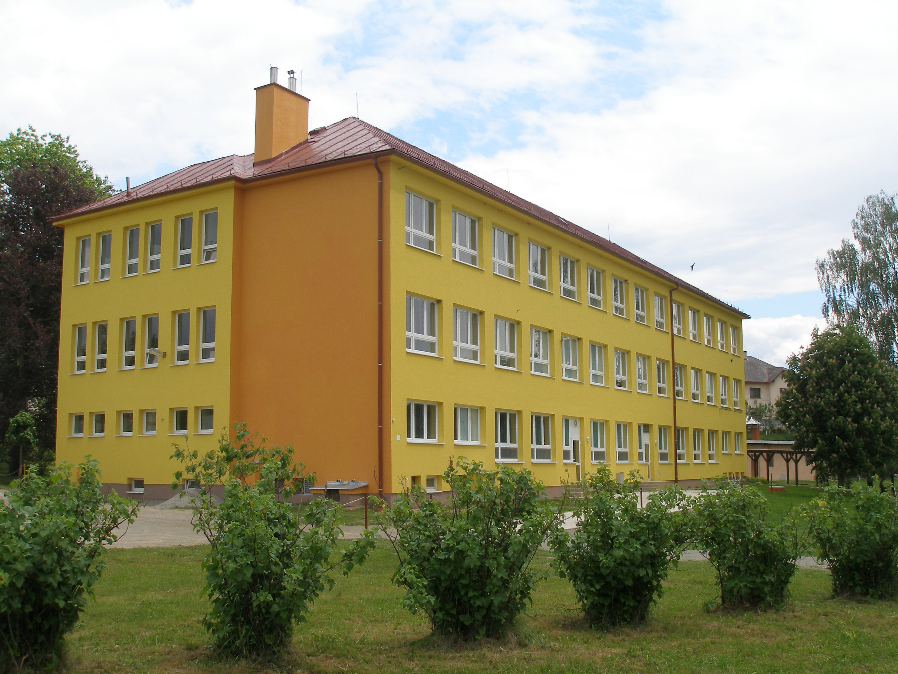 27.mája 2012 bola rekonštruovaná budova školy slávnostne odovzdaná do užívania. Obec Sedlice.